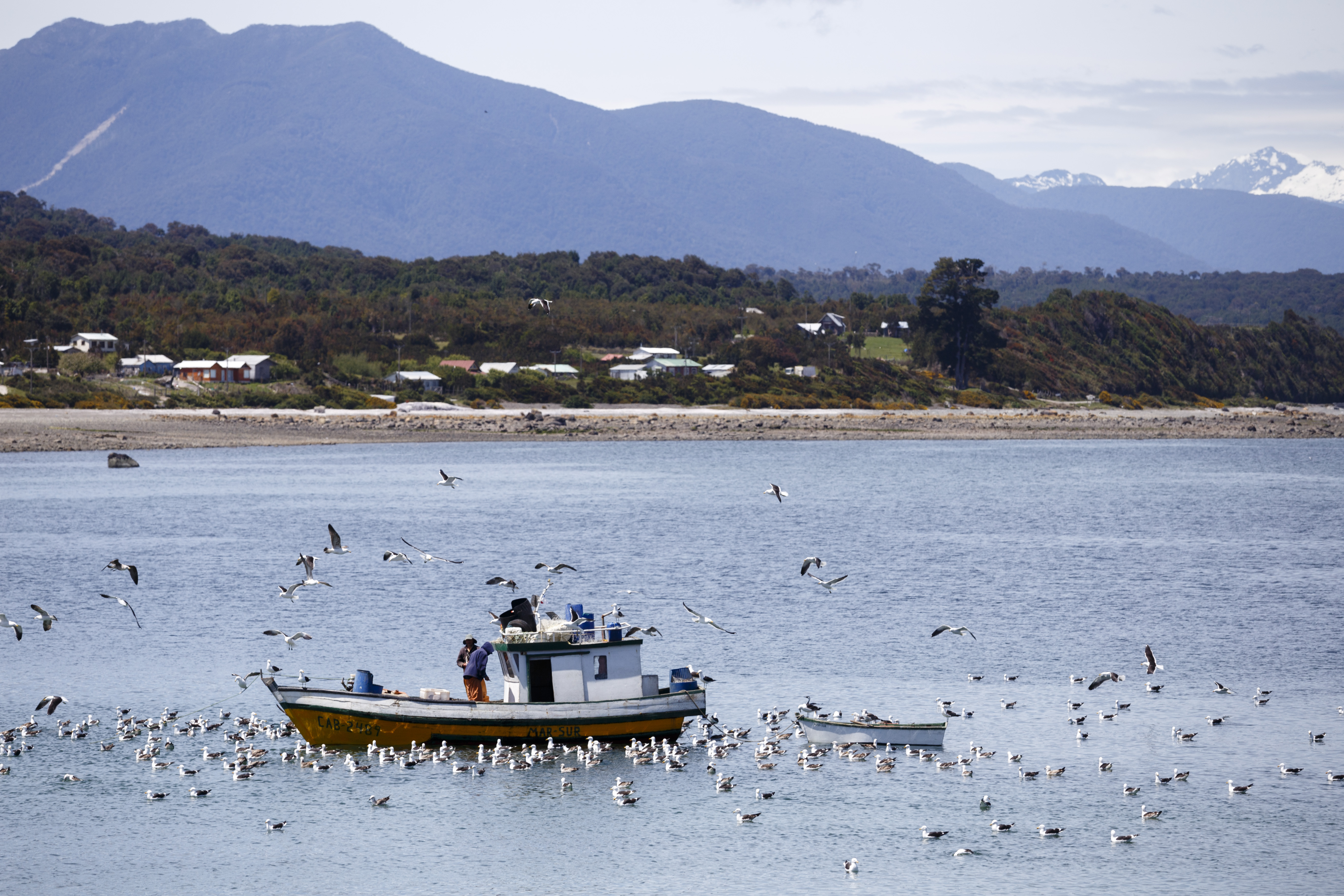 Lancha de pescadores en Rolecha, Hualaihué, Chile.